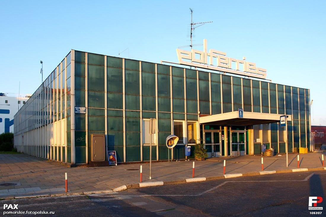 Przeszklony pawilon bazy promowej Polferries przy ulicy Przemysłowej 1.